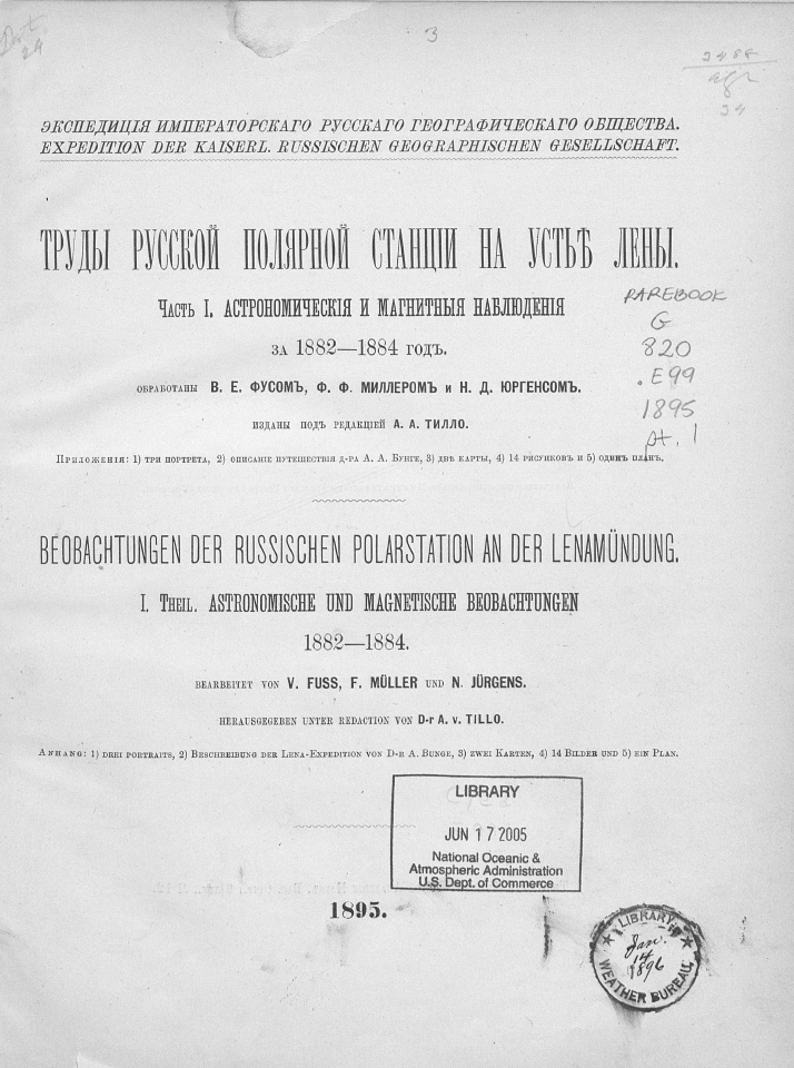 Ленская экспедиция Николая Даниловича Юргенса 1881—1884 годов, титульный лист.